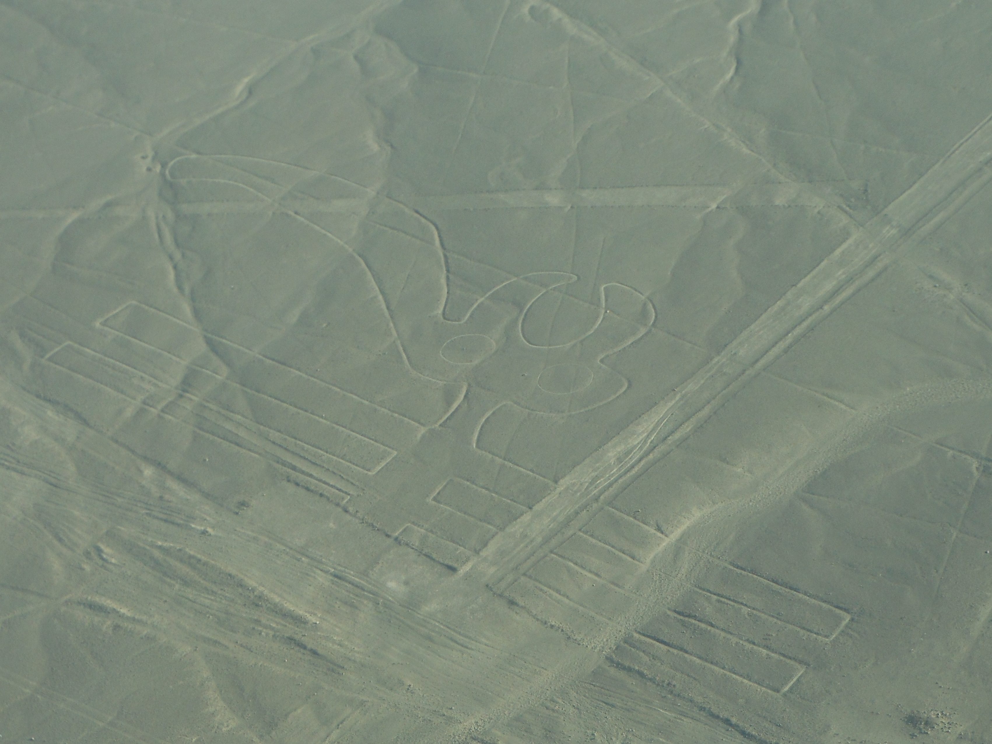 Pappagallo, Linee di Nasca/Nazca